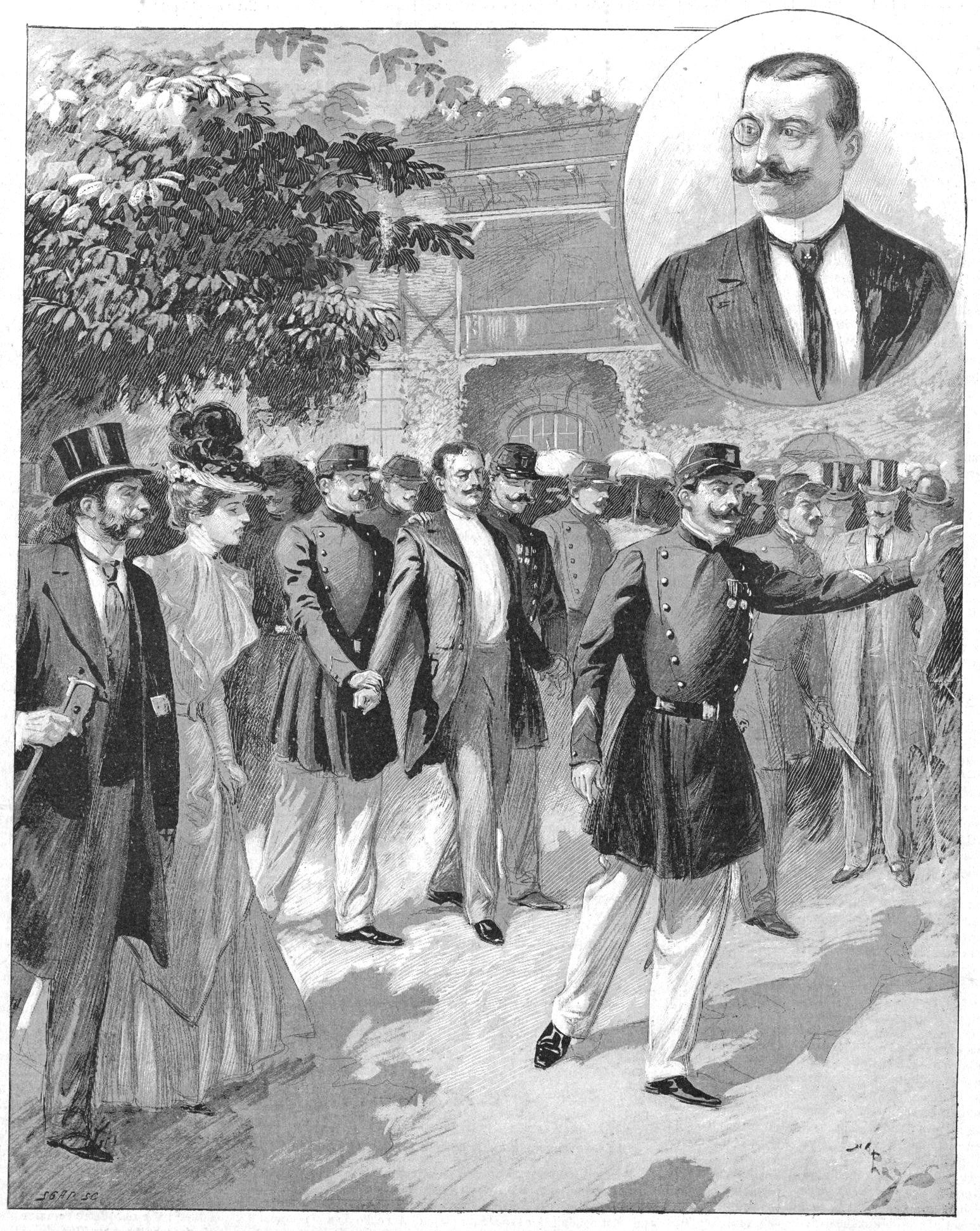 "L'arrestation du baron Christiani à l'hippodrome d'Auteuil. (Dessin de M. Parys, d'après une photographie de M. Borie.)"